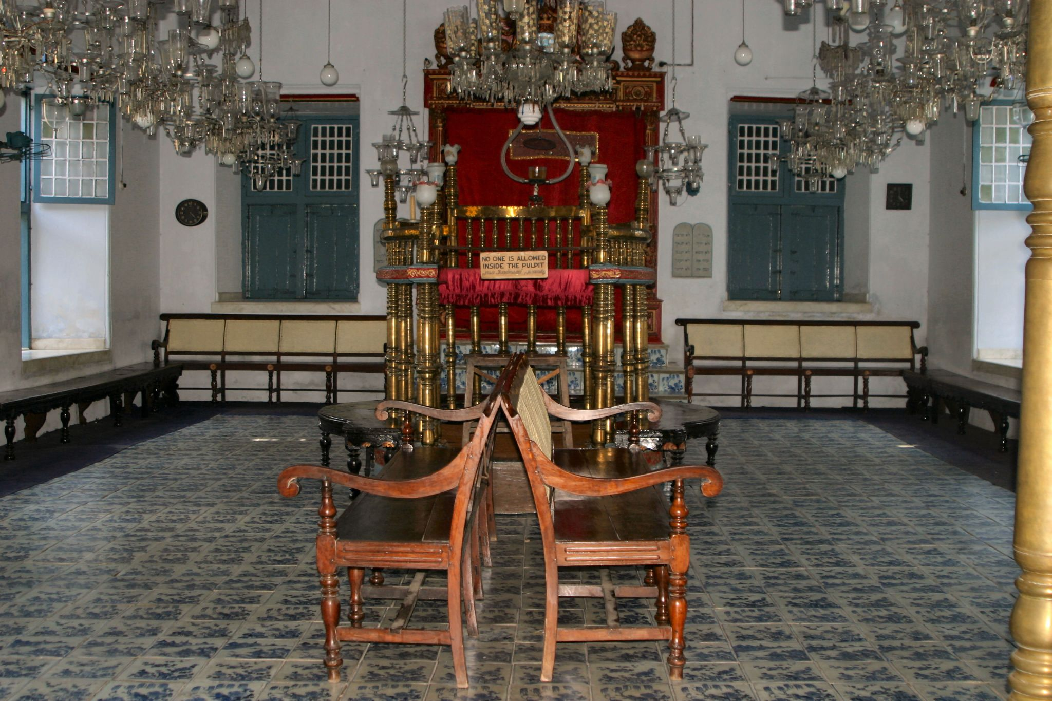 Built in 1568